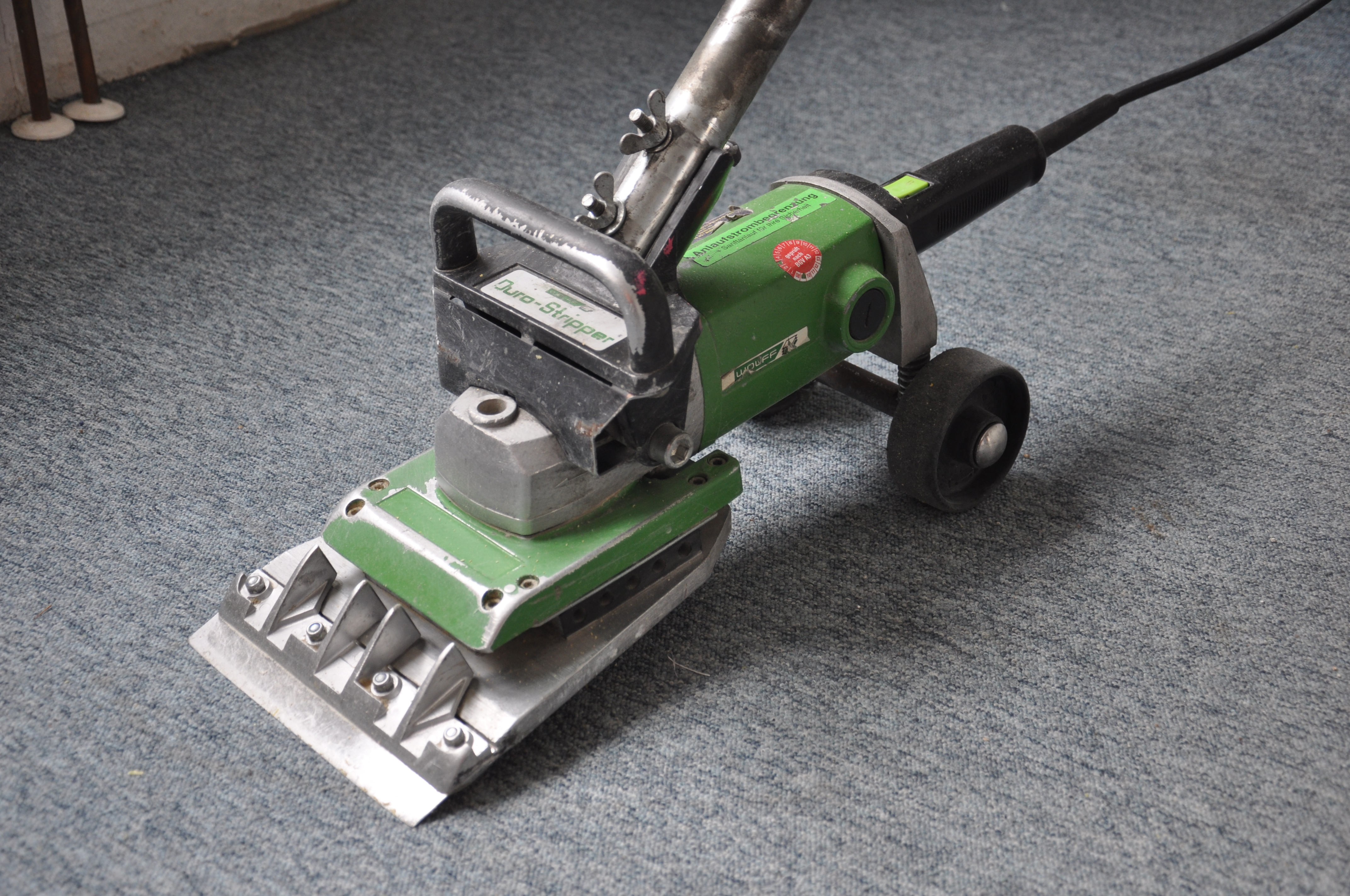 Detailansicht eines Teppich-Strippers zum entfernen von Teppich oder ähnlichen Bodenbelägen, mit: Scherklinge, Haltegriff, Motor und Stromkabel